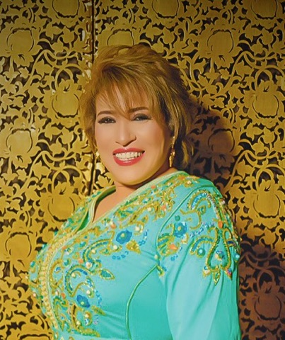 Najat Aatabou photo1